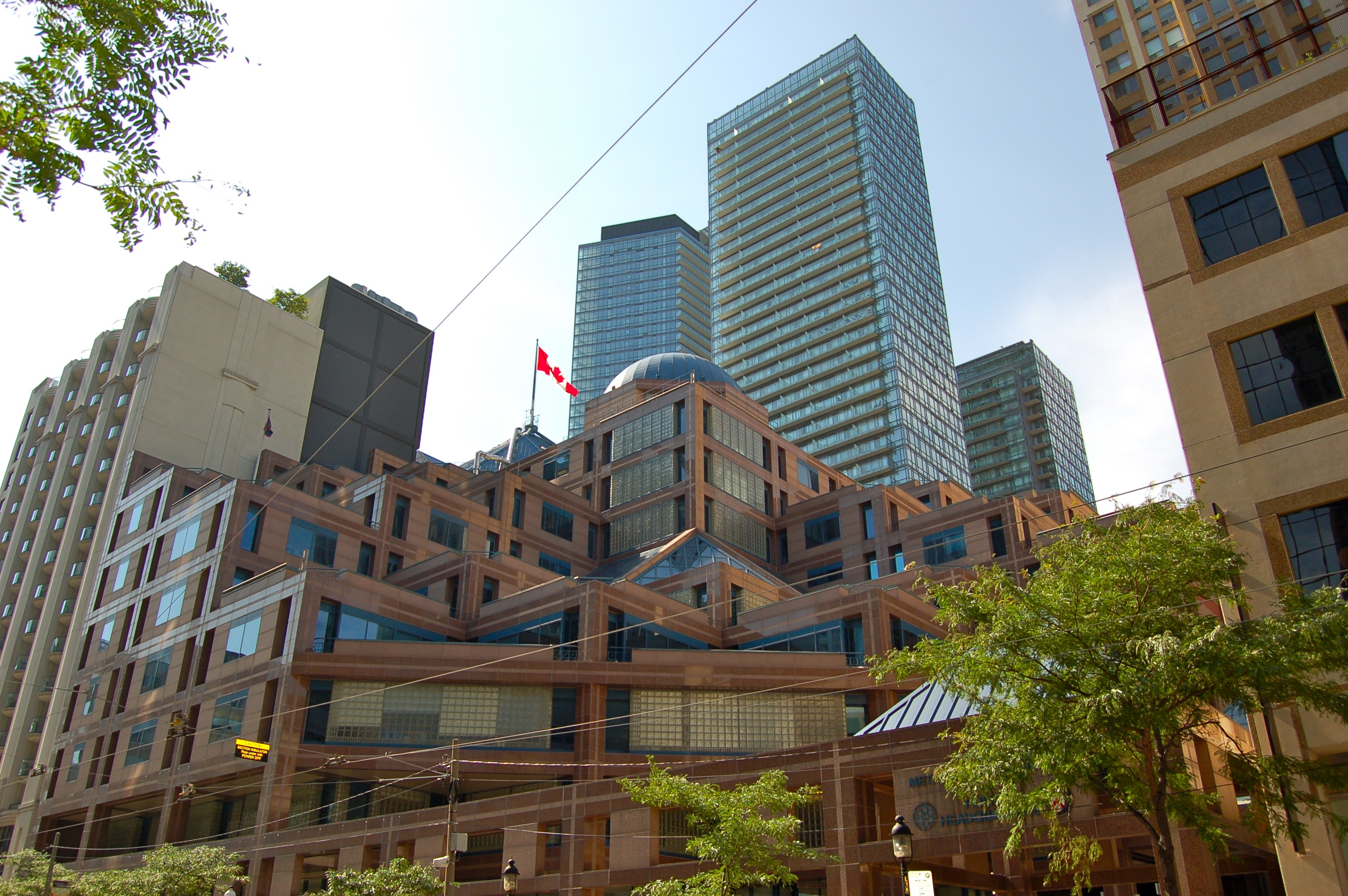 Toronto Police Headquarter